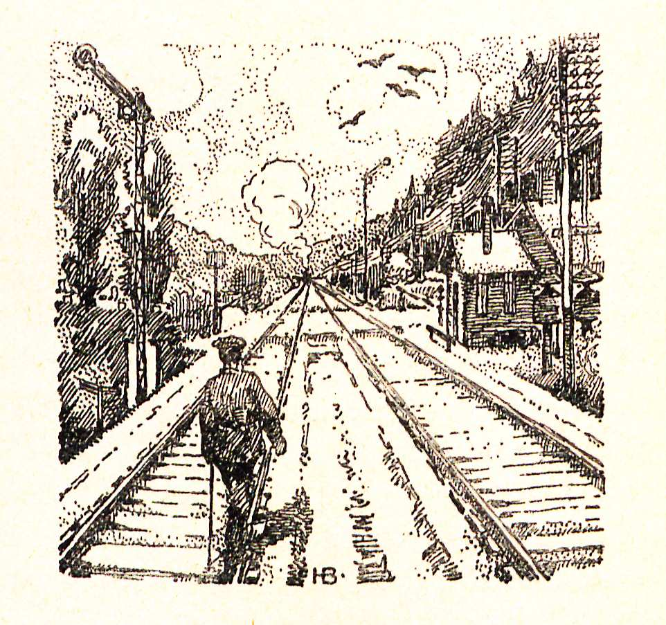 Hans Baluschek BC4ü